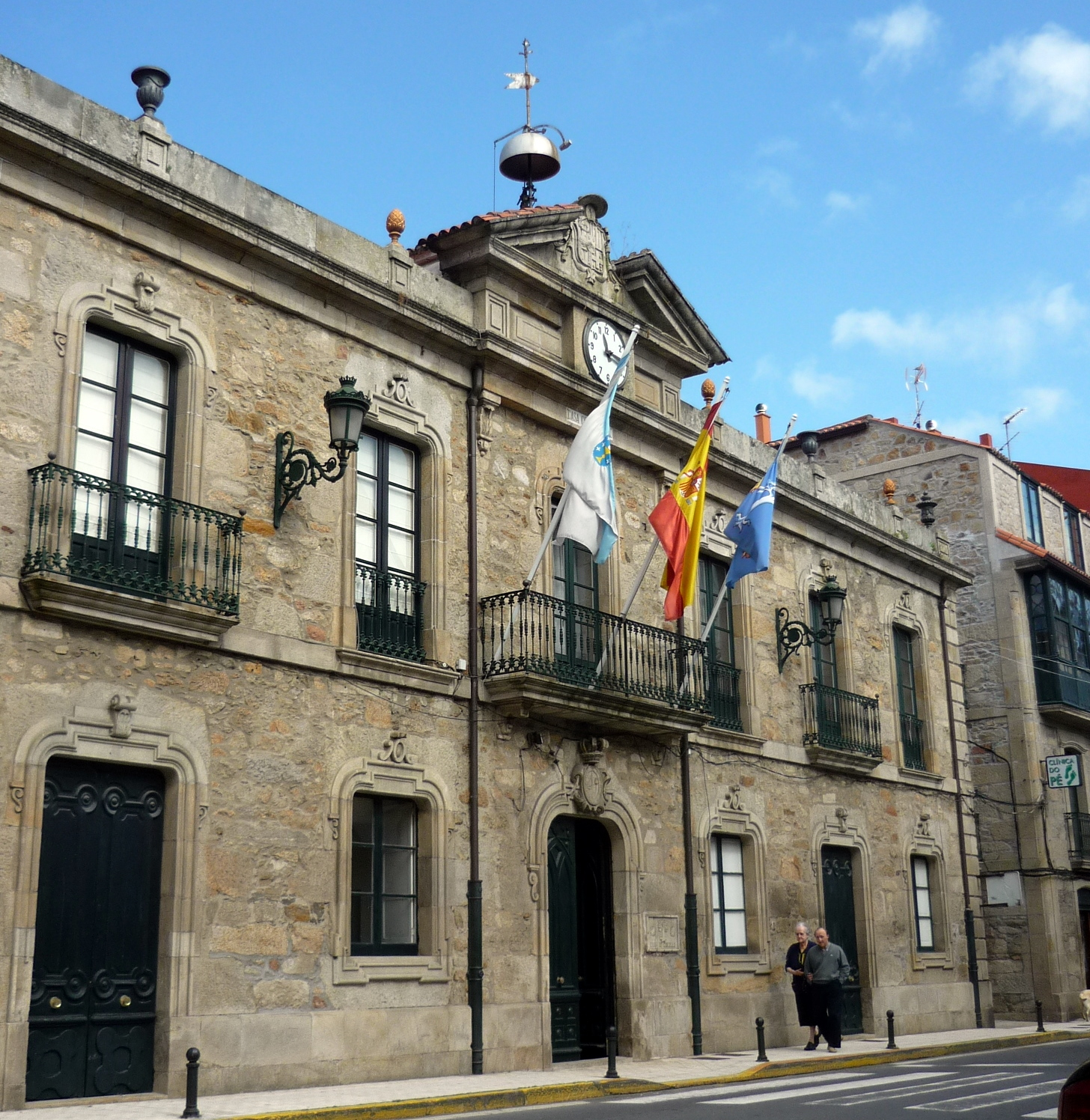 Concello de A Pobra casa consistorial